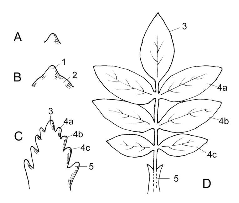 Development of a leaf/Entwicklung eines gefiederten Blattes. A Blatthöcker; B Gliederung in Unter- und Oberblatt; C Anlage der Fiederblätter; D fertiges Blatt; 1 = Oberblatt; 2 = Unterblatt; 3 = Endfieder; 4a,b,c Seitenfiedern; 5 = Nebenblatt